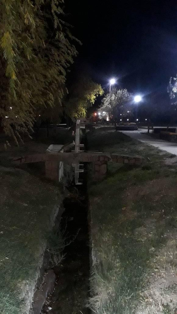 Paseo del Boulevard